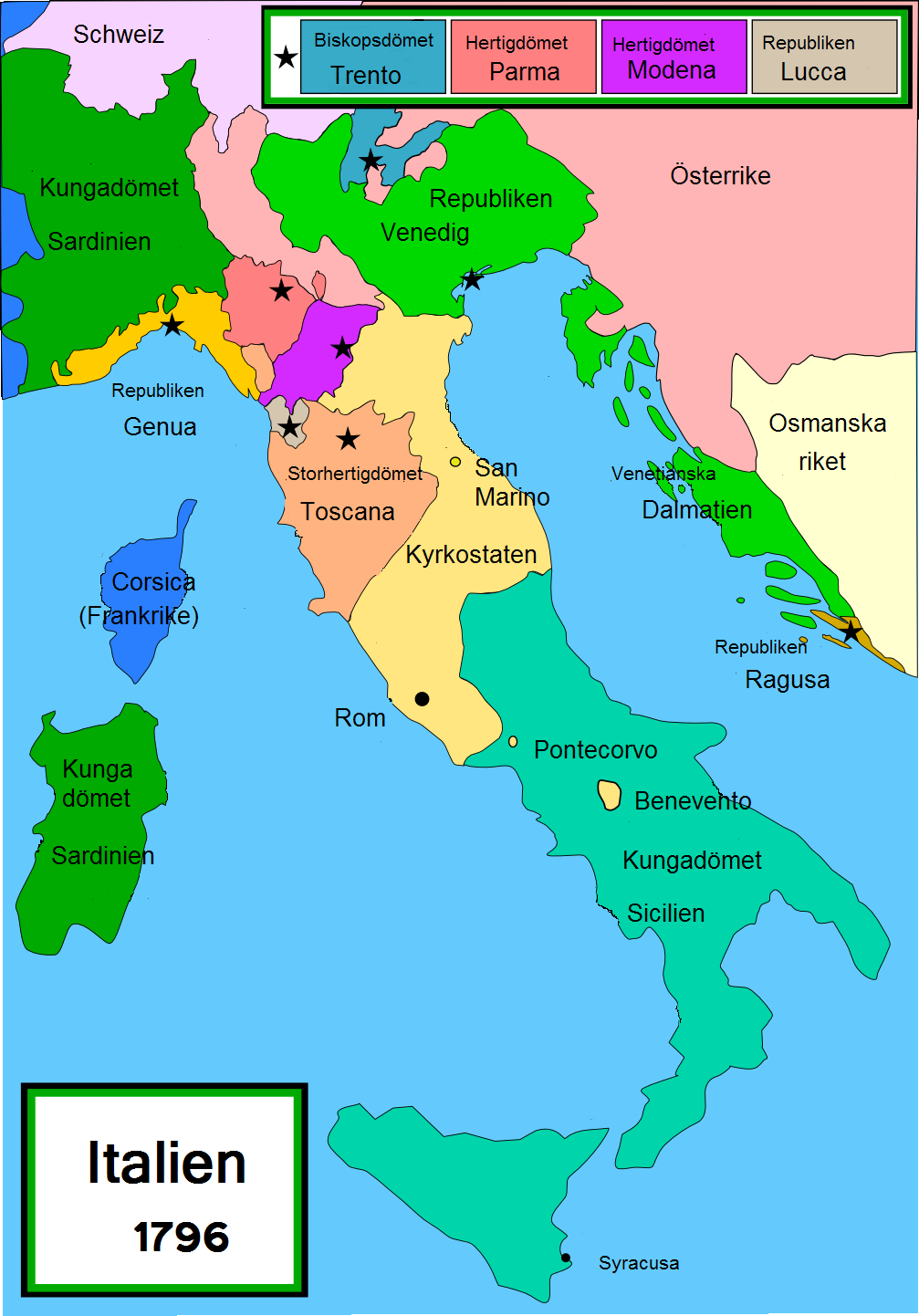 Kart over Italia i 1796.